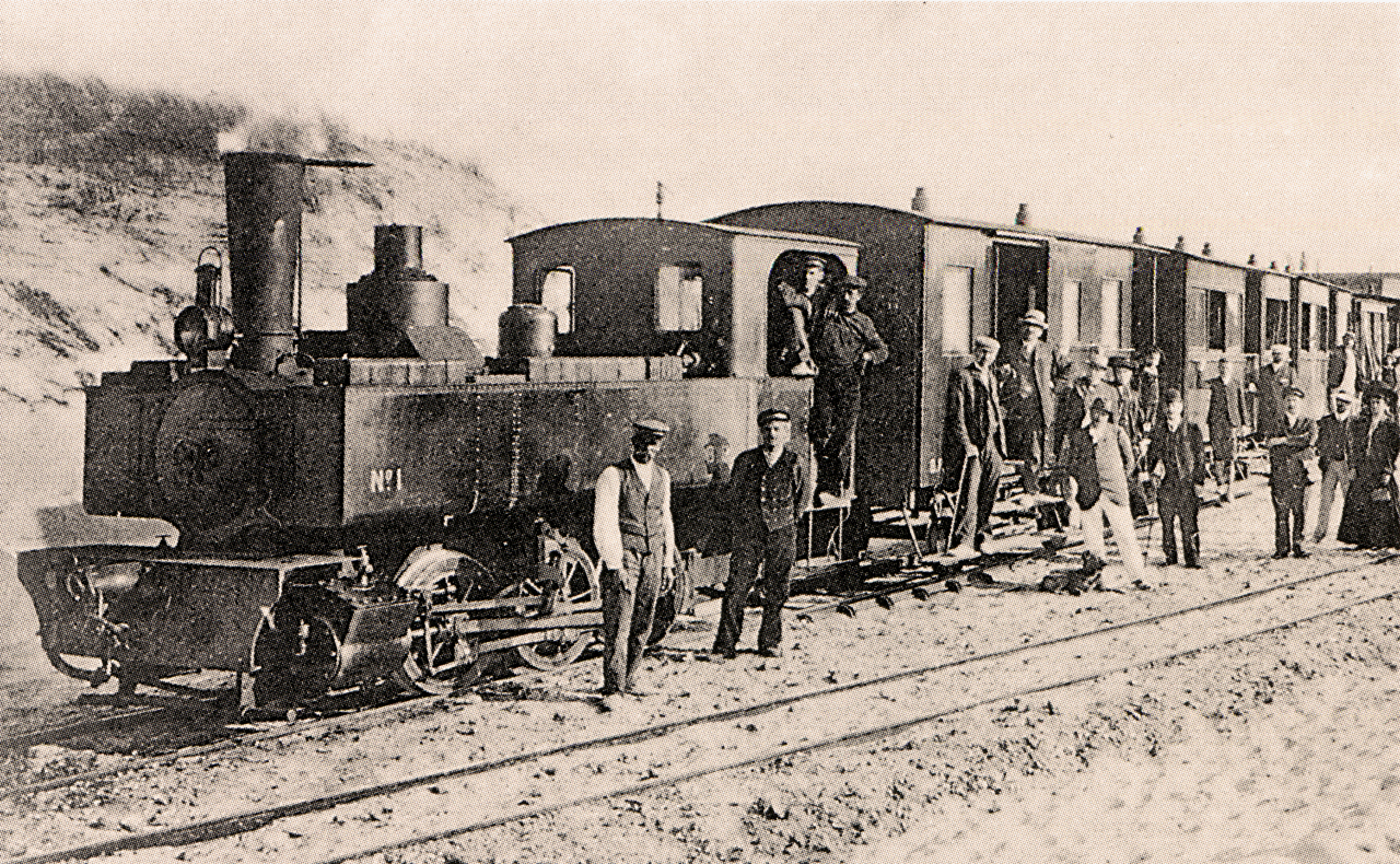 Sur la ligne Berck-Plage - Paris-Plage, train à l'arrêt au milieu des dunes de Merlimont